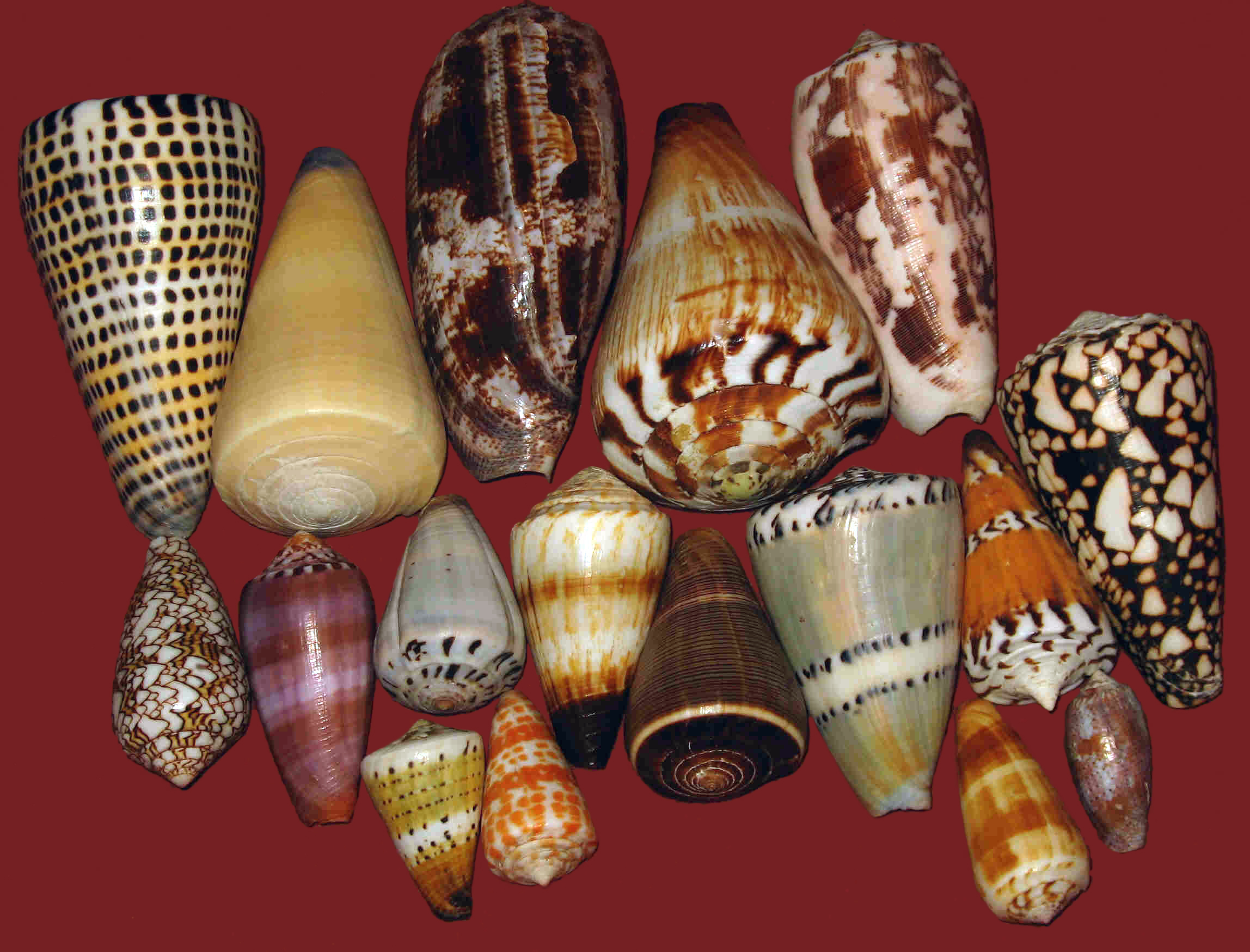 Conidae